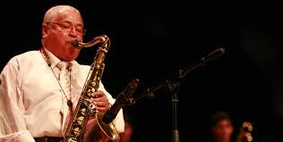 Justo Almario